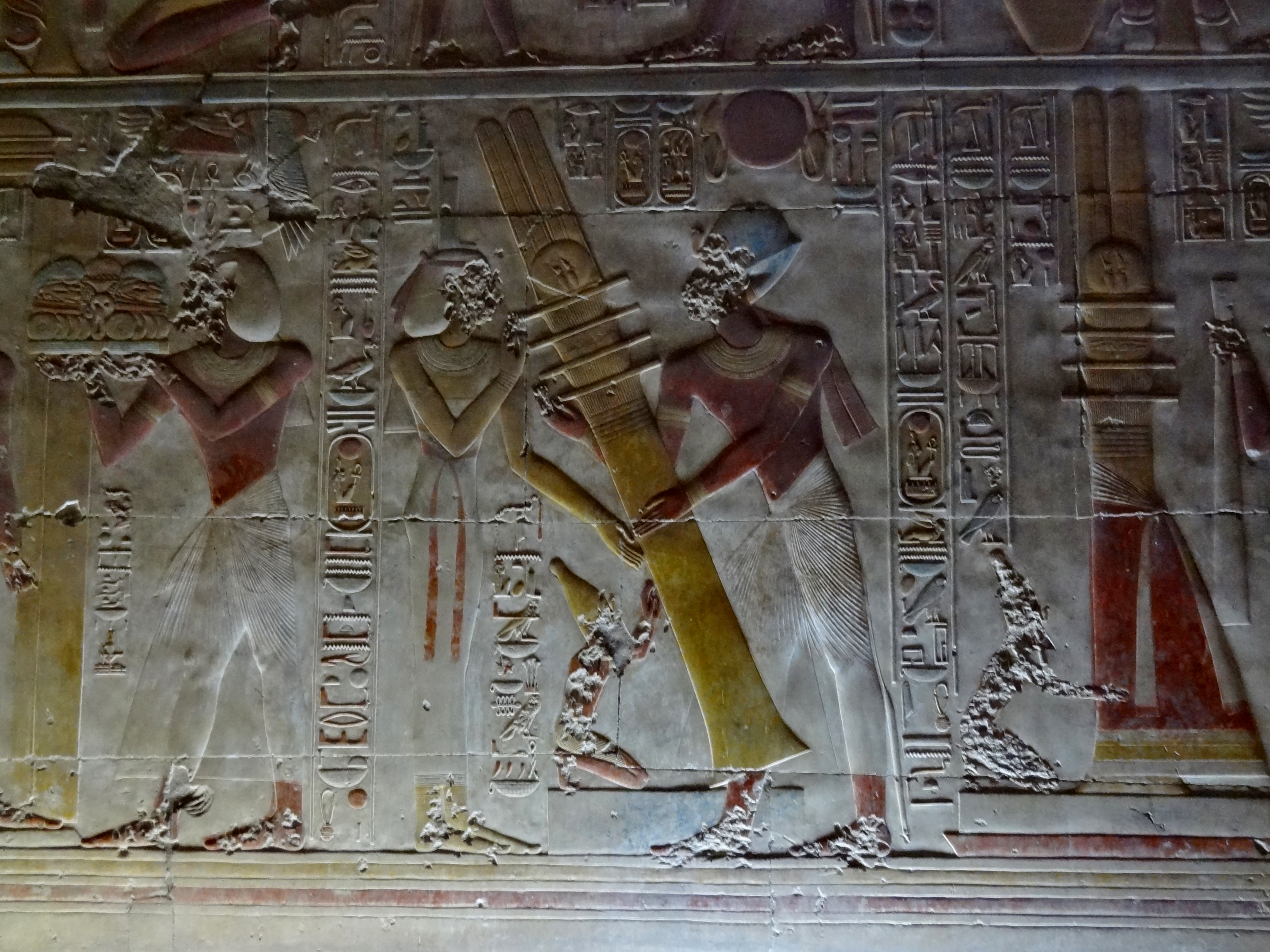 Südwestwand in der ersten Halle des Osiris-Komplexes im Totentempel des Sethos I. von Abydos, Ägypten